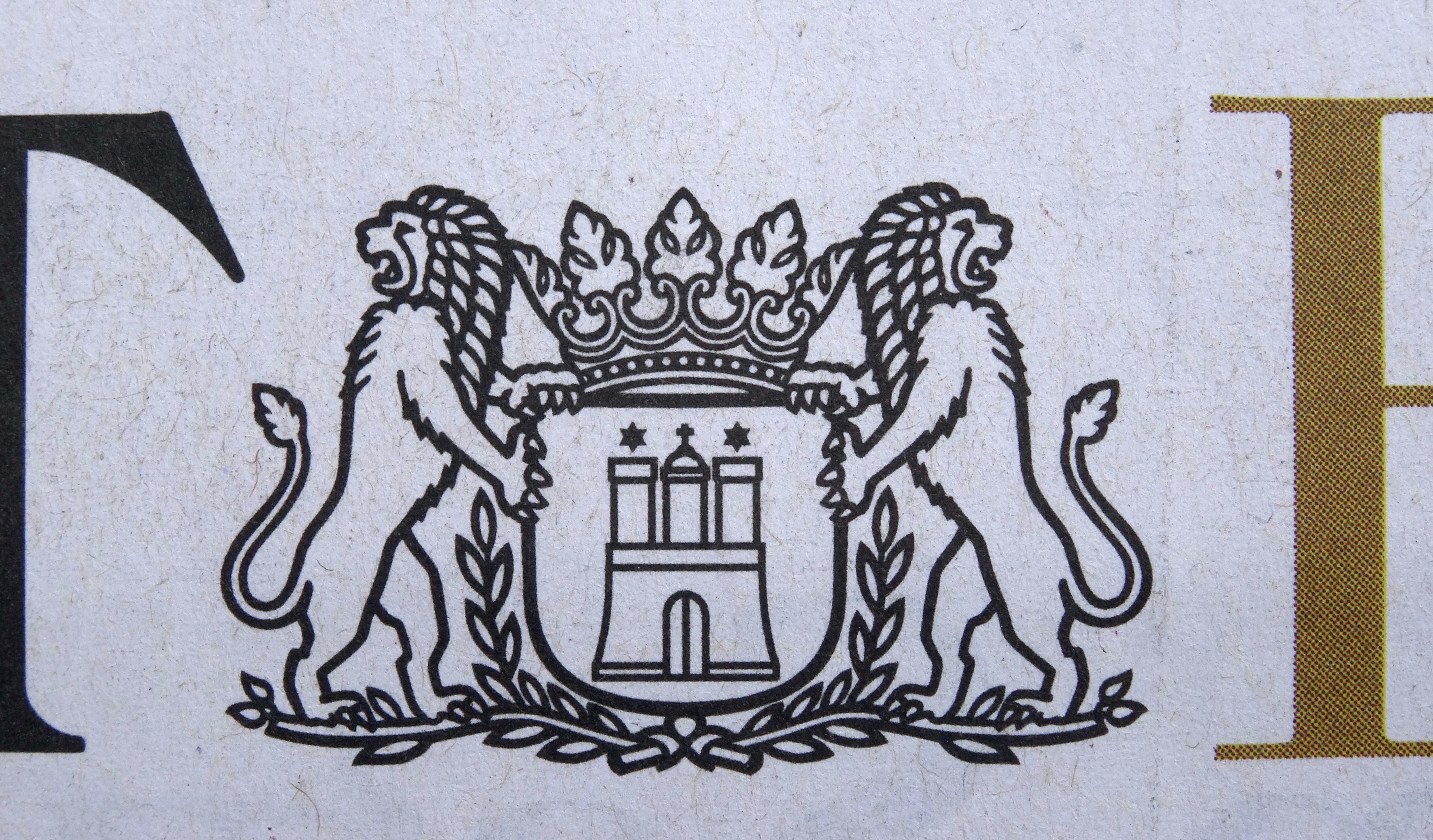 aus der neuen Kopfzeile für die Hamburg-Beilage der ZEIT